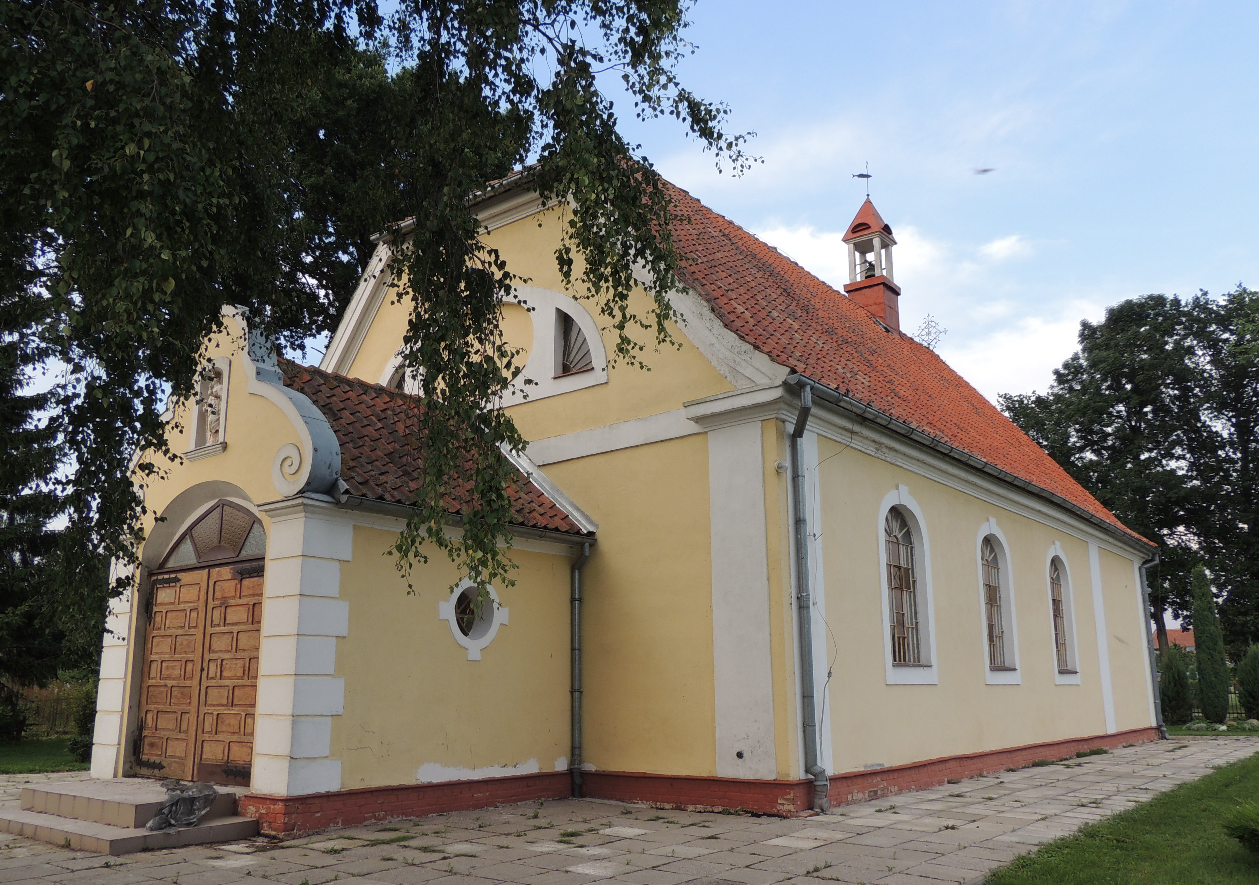 Nowa Pasłęka - kościół filialny p.w. Matki Boskiej Miłosierdzia, 1926